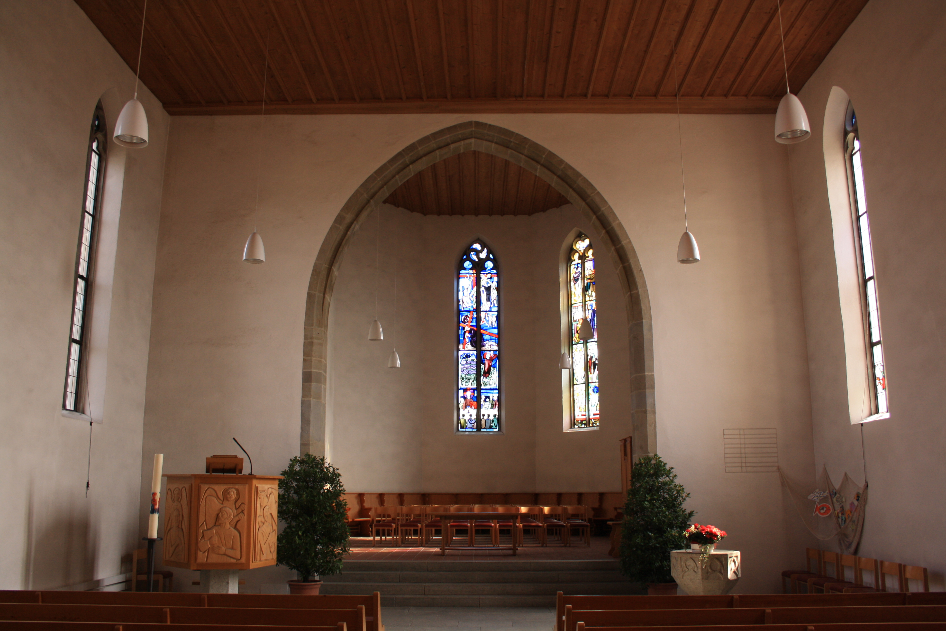 Reformierte Kirche Suhr